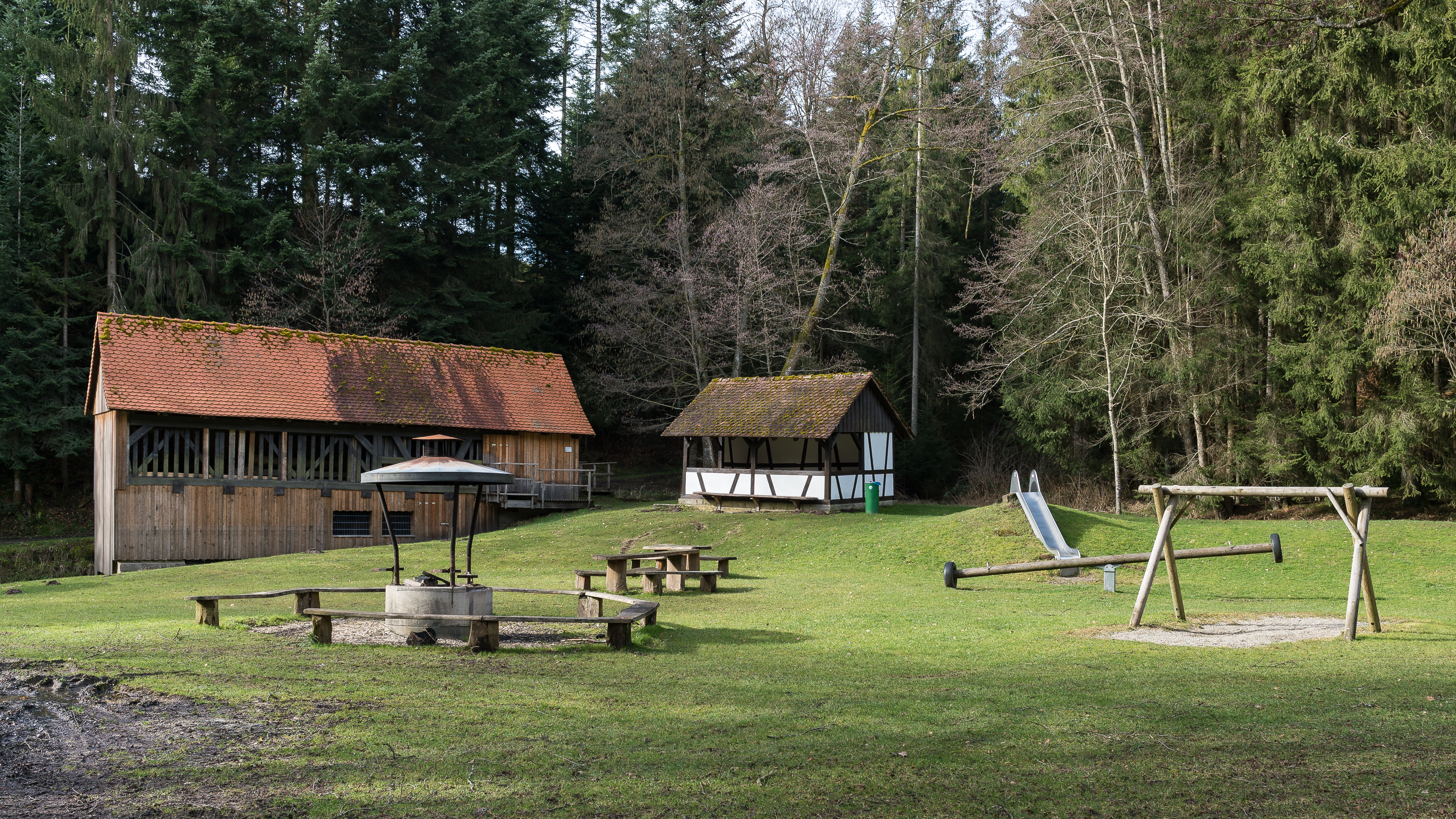 Die Vaihinghöfer Sägmühle "Hummelgautsche" mit Grillstelle und Spielplatz, rund 10 km nördlich der Gemeinde Alfdorf.Ende September 2019 trafen sich hier mehrere Personen zur Gründung der mutmaßlich rechtsextremen Terrorgruppe "Der harte Kern". Das Treffen wurde von einem Mobilen Einsatzkommando der Polizei observiert, bei mehreren Razzien im Bundesgebiet am 14. Februar 2020 wurden schließlich 12 Personen festgenommen sowie Waffen und Sprengstoffe sichergestellt.